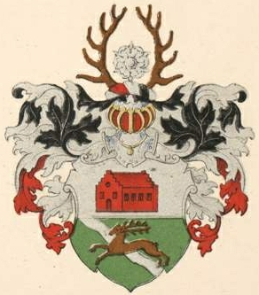 Lantingshauseni suguvõsa aadlivapp